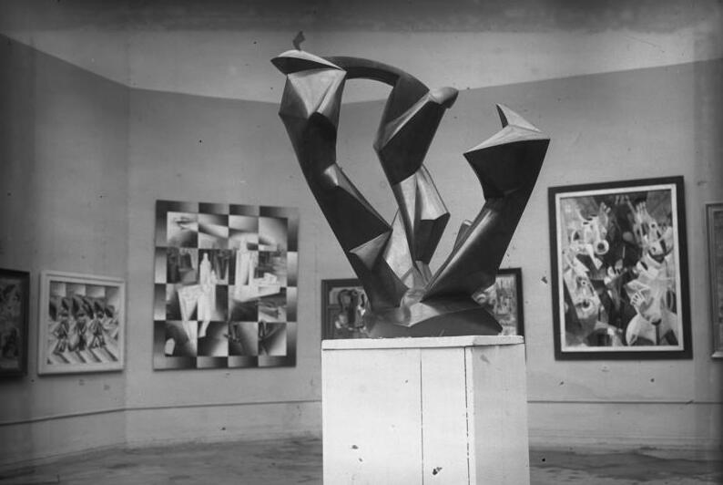 Die Eröffnung der grossen juryfreien Kunstausstellung am Lehrter Bahnhof in Berlin! Eine interessante Plastik "Dreiklang" von Rudolf Belling, Berlin, auf der Ausstellung.